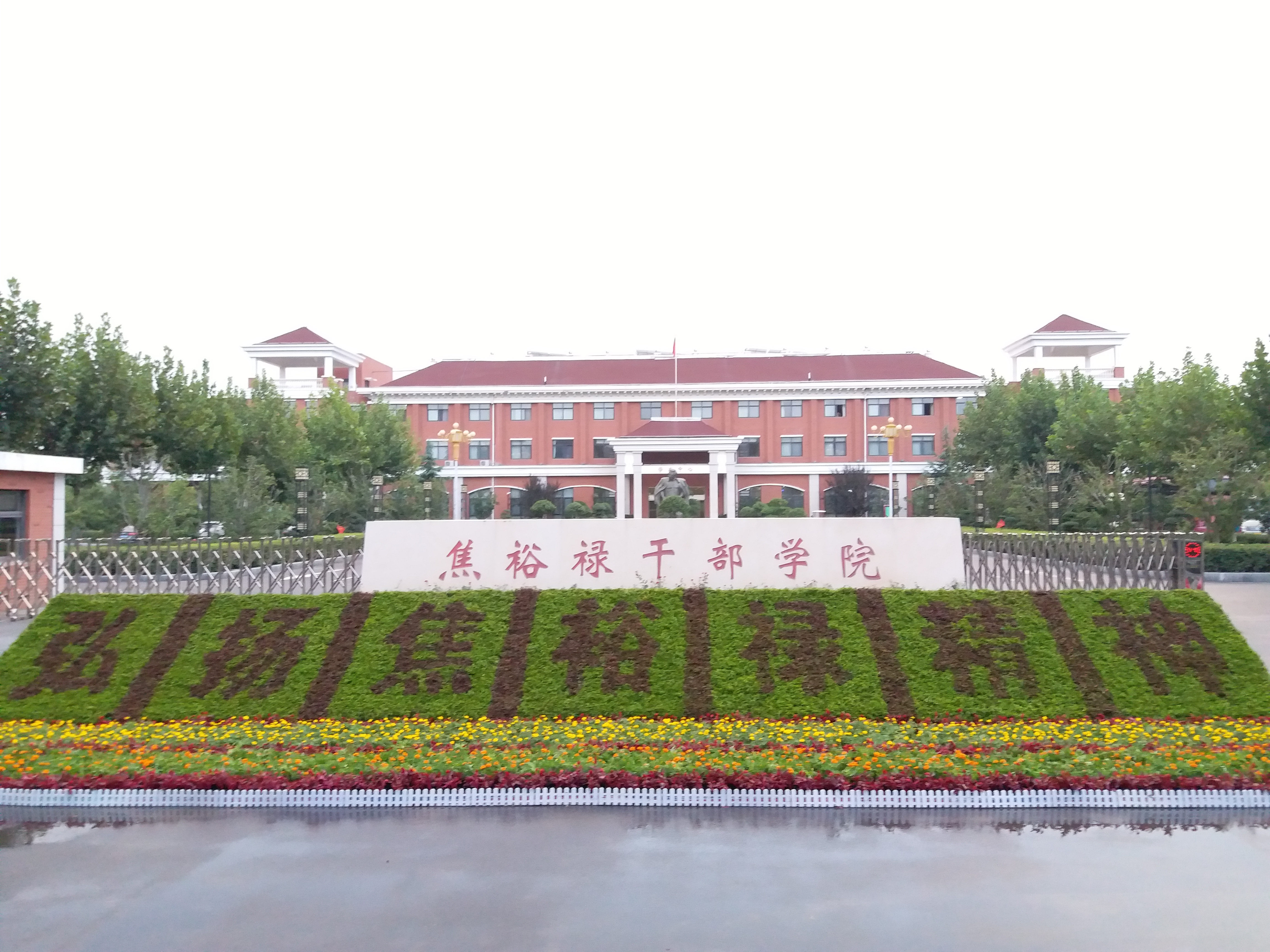 焦裕禄干部学院，2017年于中国兰考